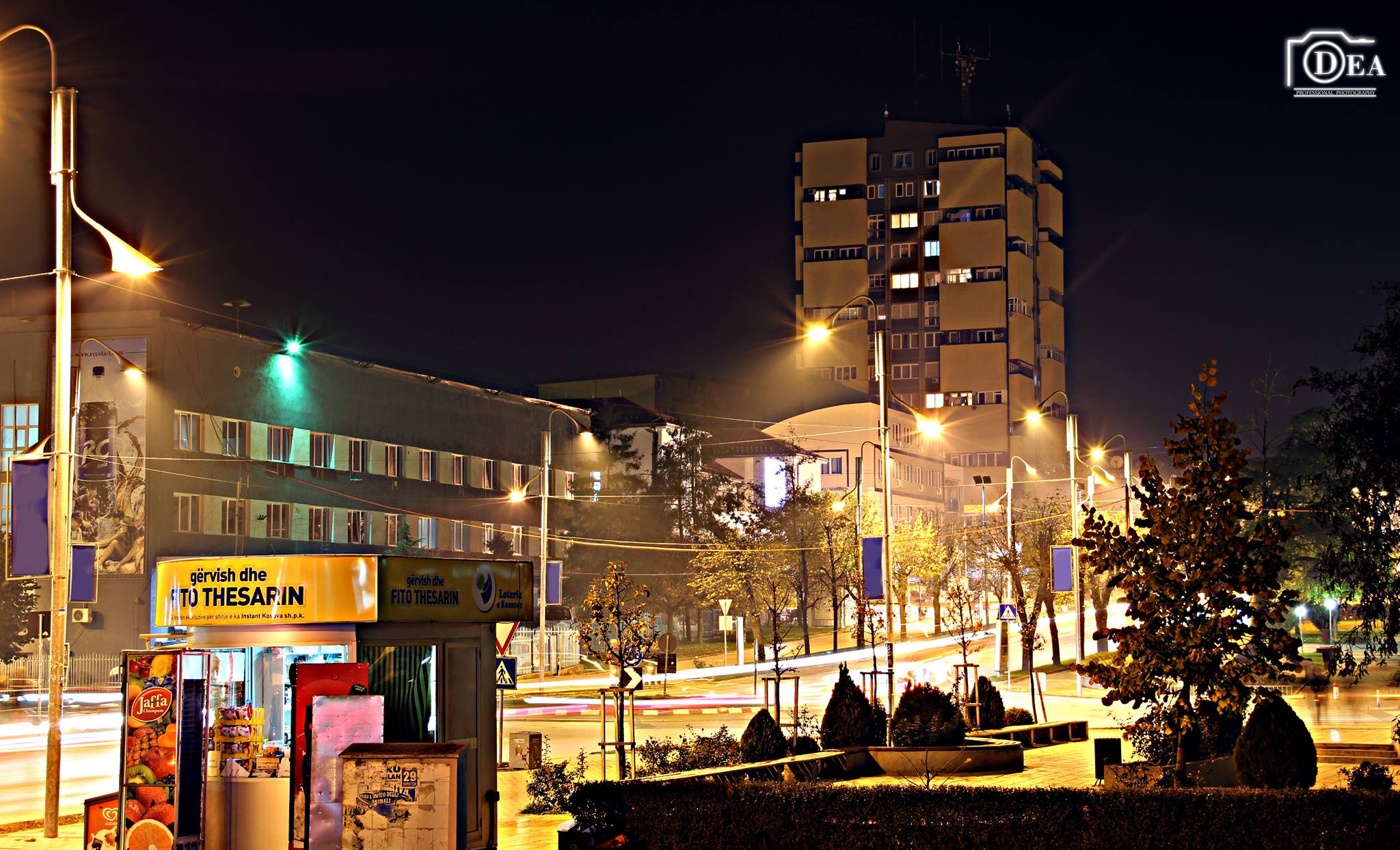 Gjilan